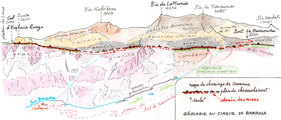 Géologie schématique du cirque de Barrosa montrant sa structure en deux étages, identifiant leurs différentes roches, situant le chemin des mines et précisant son lien avec la géologie du cirque